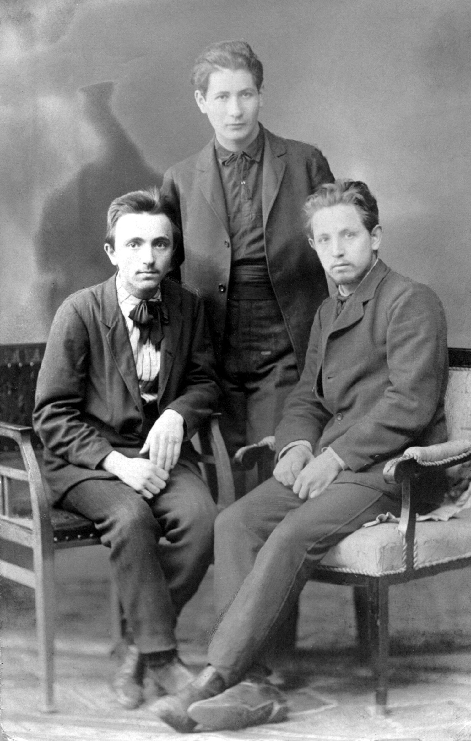 יוסף זלצמן, אלקנה הורביץ ואליעזר סלוצקין חבריו מחו"ל אנשי העלייה השנייה. שלושה חברים בעלי השקפת עולם ציונית-סוציאליסטית ועלו ארצה. יוסף זלצמן נרצח ב-24 בנובמבר 1913 ממארב של בדואים ליד ביתניה תחתית